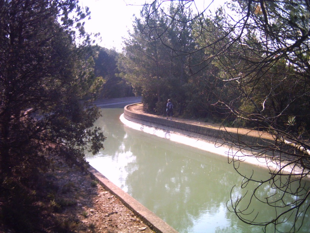 Cheminement le long du canal de Marseille dans les plaines d'Arbois, entre Roquefavour et Réaltor.